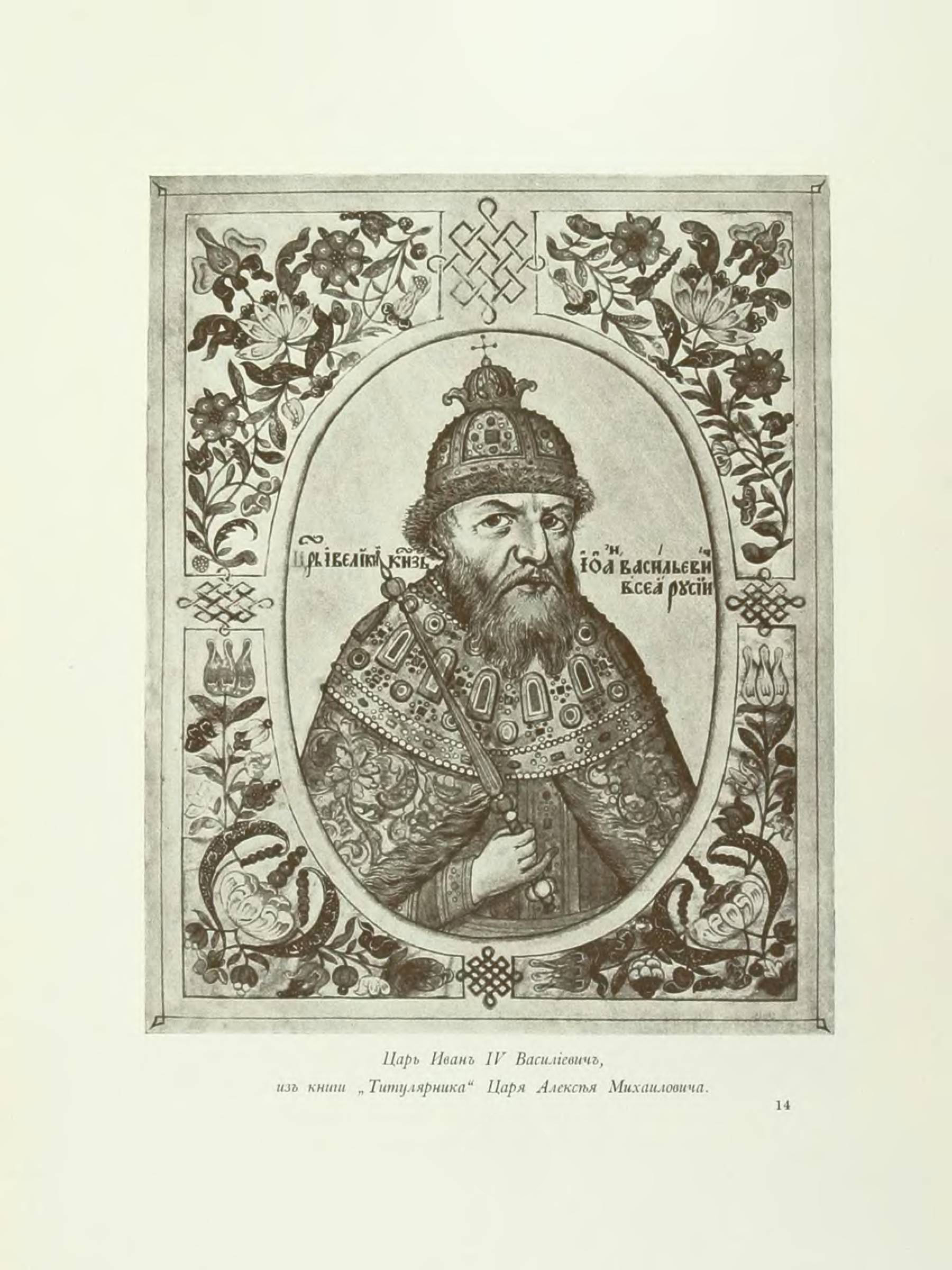 Великокняжеская, царская и императорская охота на Руси